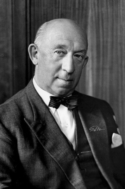 Harald Torp (1890–1972), redaktør i Adresseavisen i Trondheim og stortingsmann 1937–1945 og 1954–1957. Arkivreferanse: Tor.H43.B75.F5247